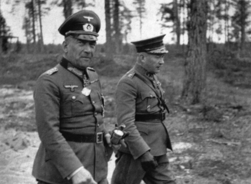 Generals Falkenhorst and Siilasvuo